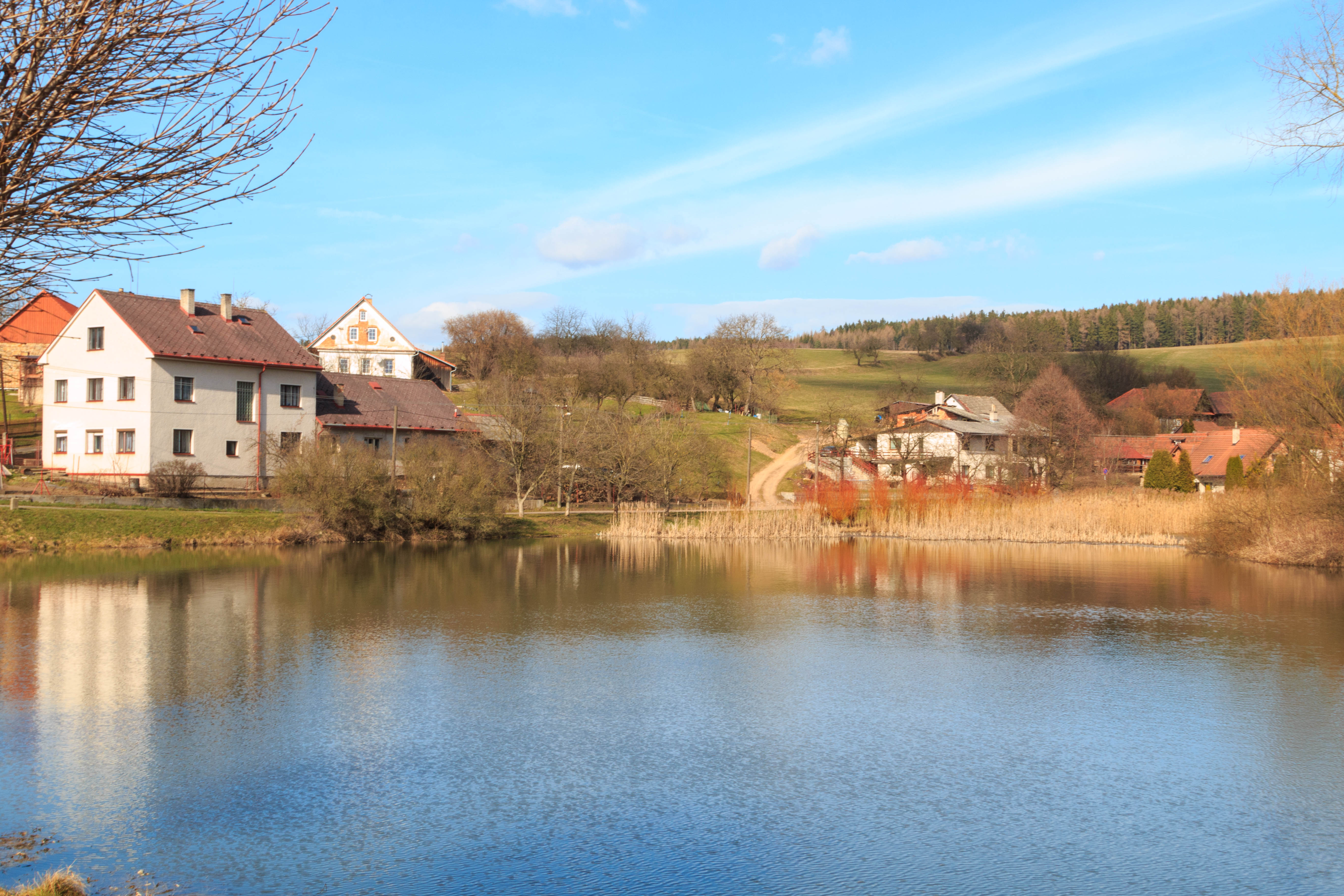 Velká Lhota - rybník